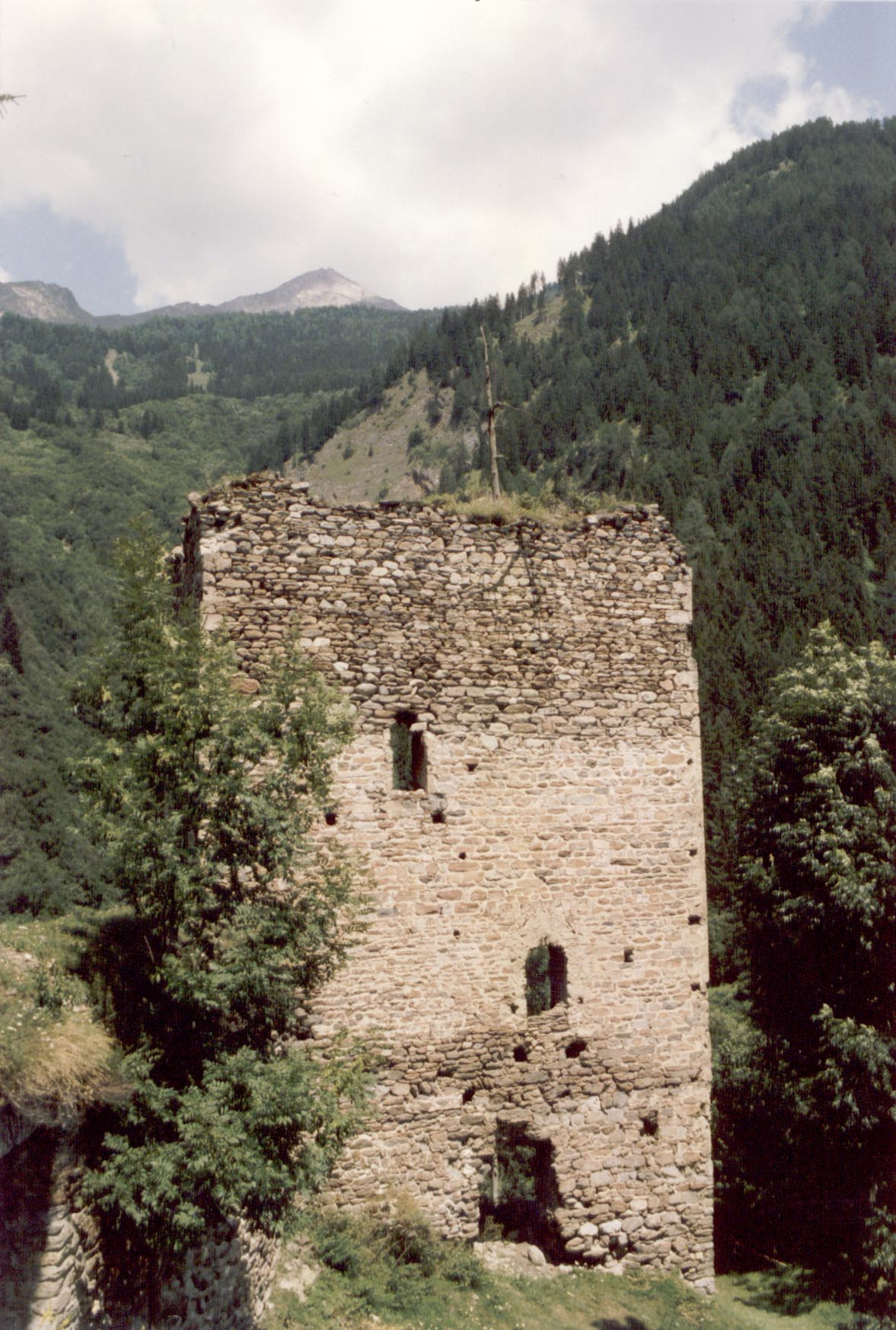 Burg Oberfalkenstein, Bergfried vom Burghof aus